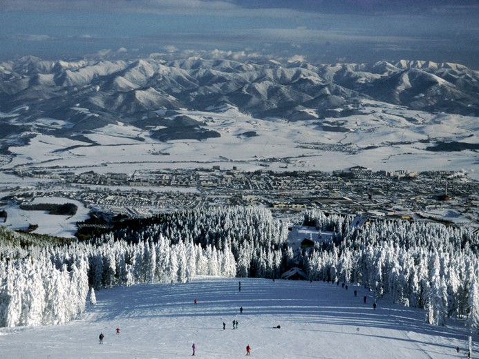 Murko